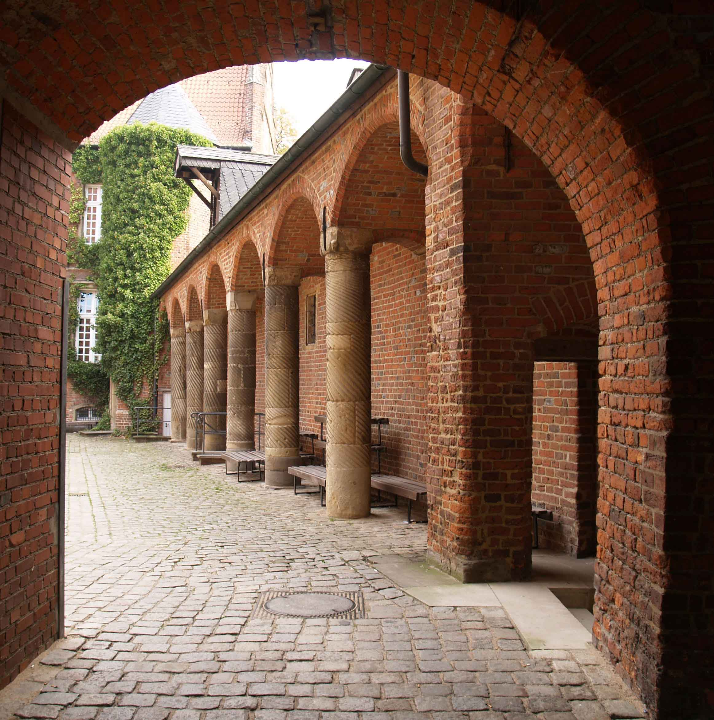 Schloss Herten, Blick durch das Torhaus auf die Säulengallerie des Südflügels